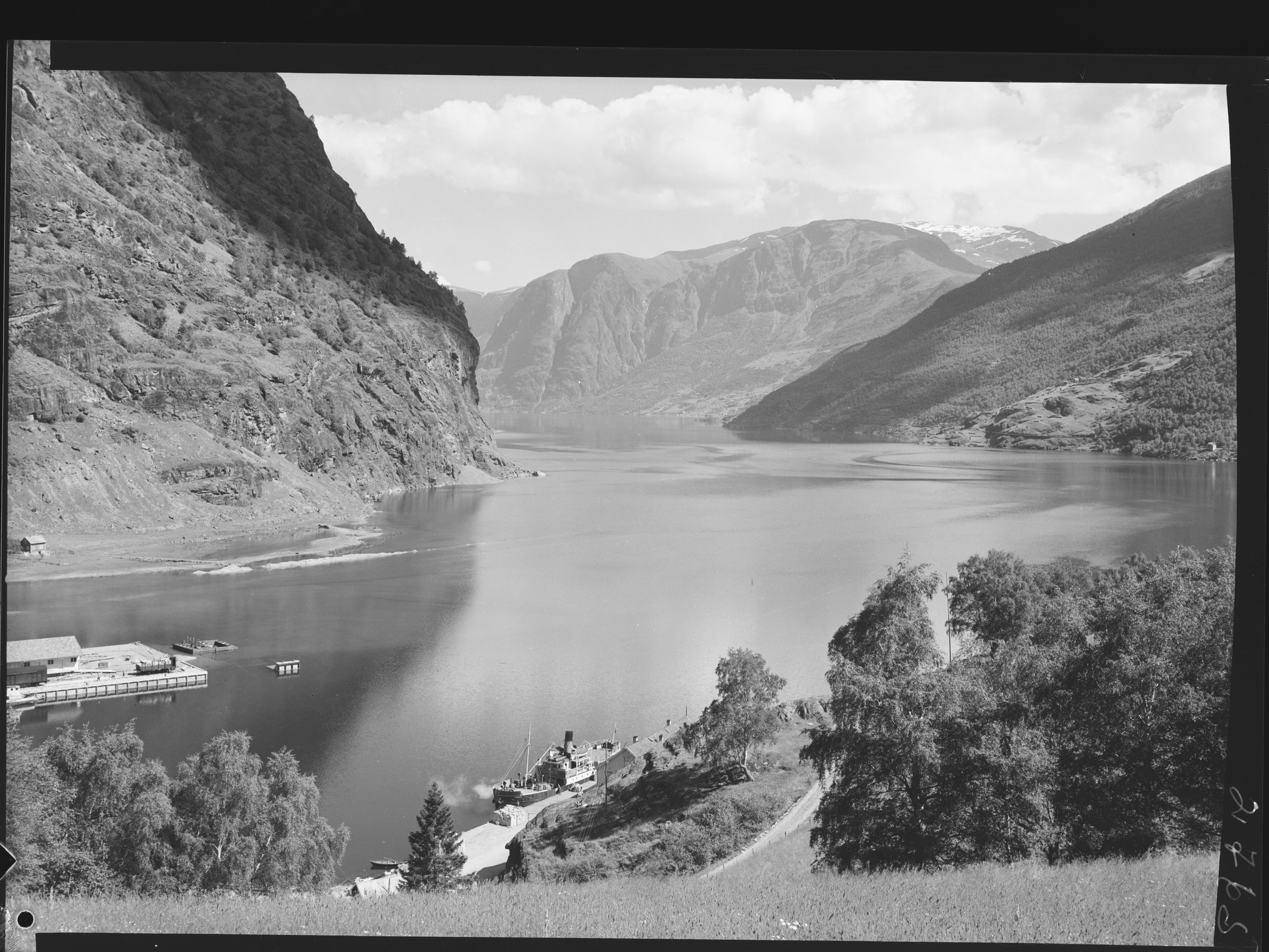 Bildet er hentet fra Nasjonalbibliotekets bildesamling. Anmerkninger til bildet var: Fotograf ukjent. Aurlandsfjorden,Flåm,Fretheim, Aurland, Sogn og Fjordane